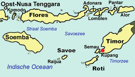 eigen werk